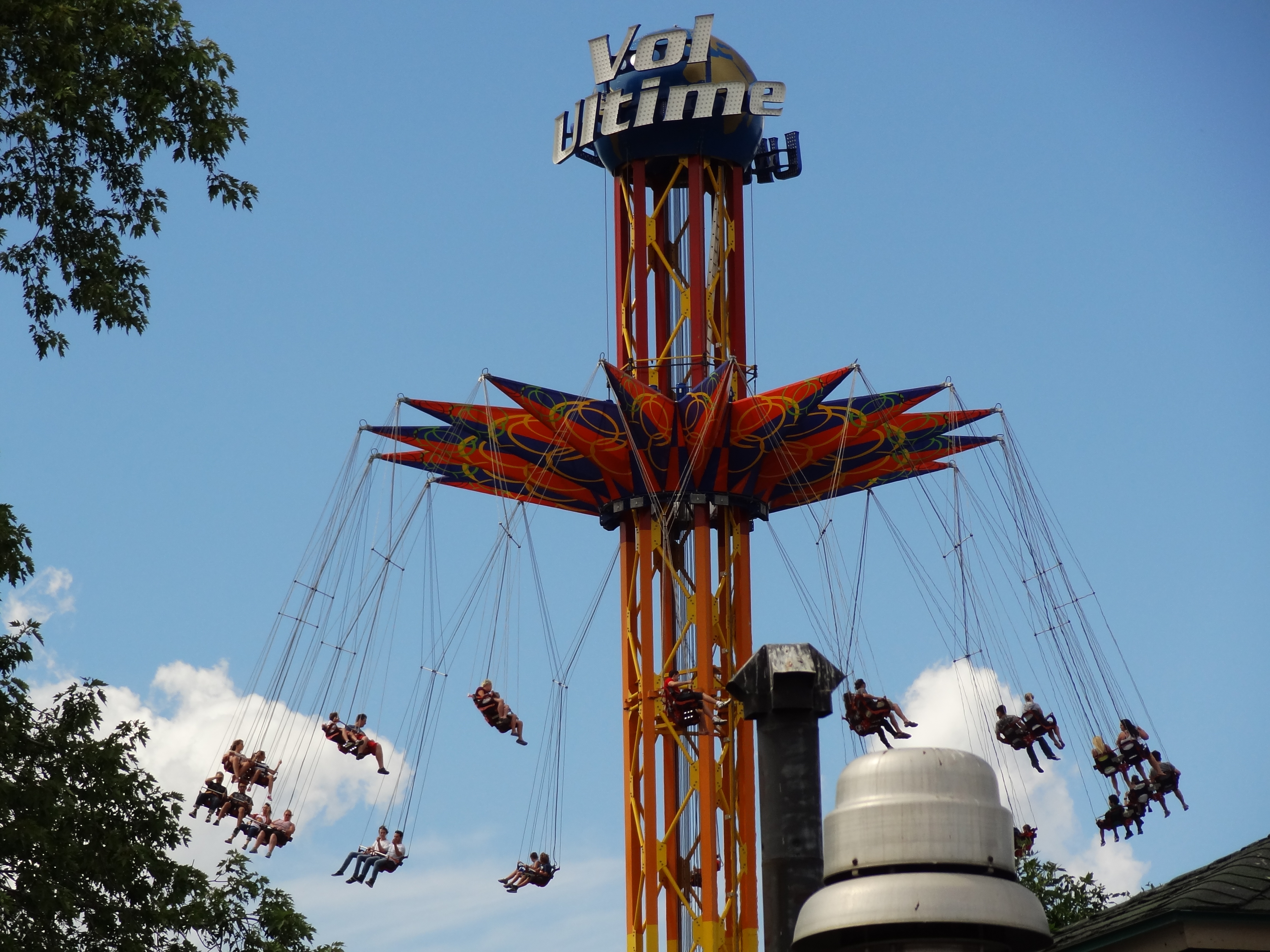 Vol Ultime, a Funtime SkyScreamer, at LaRonde